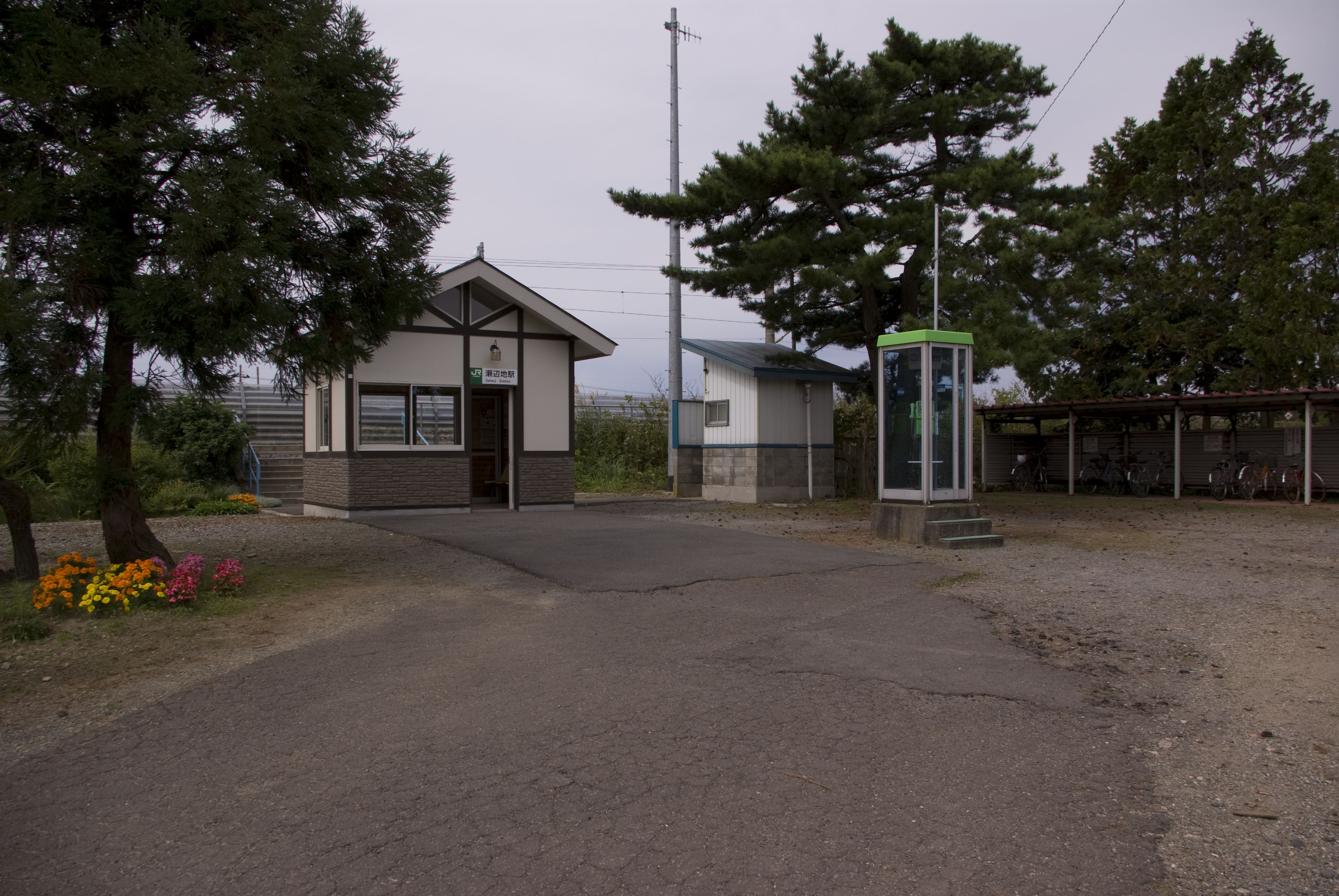 東日本旅客鉄道株式会社津軽線瀬辺地駅